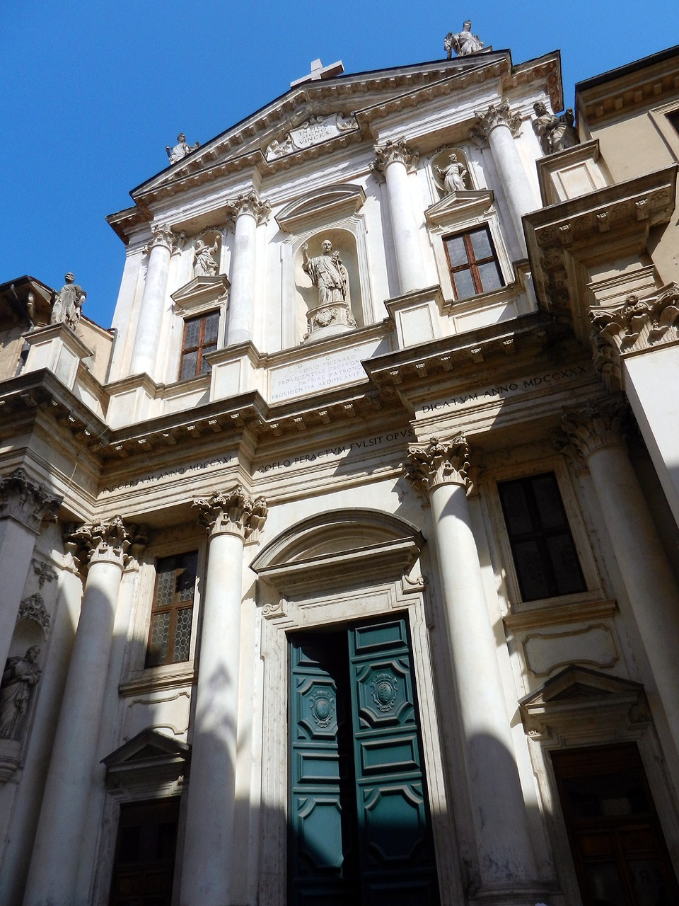 Vicenza - Chiesa di S. Gaetano